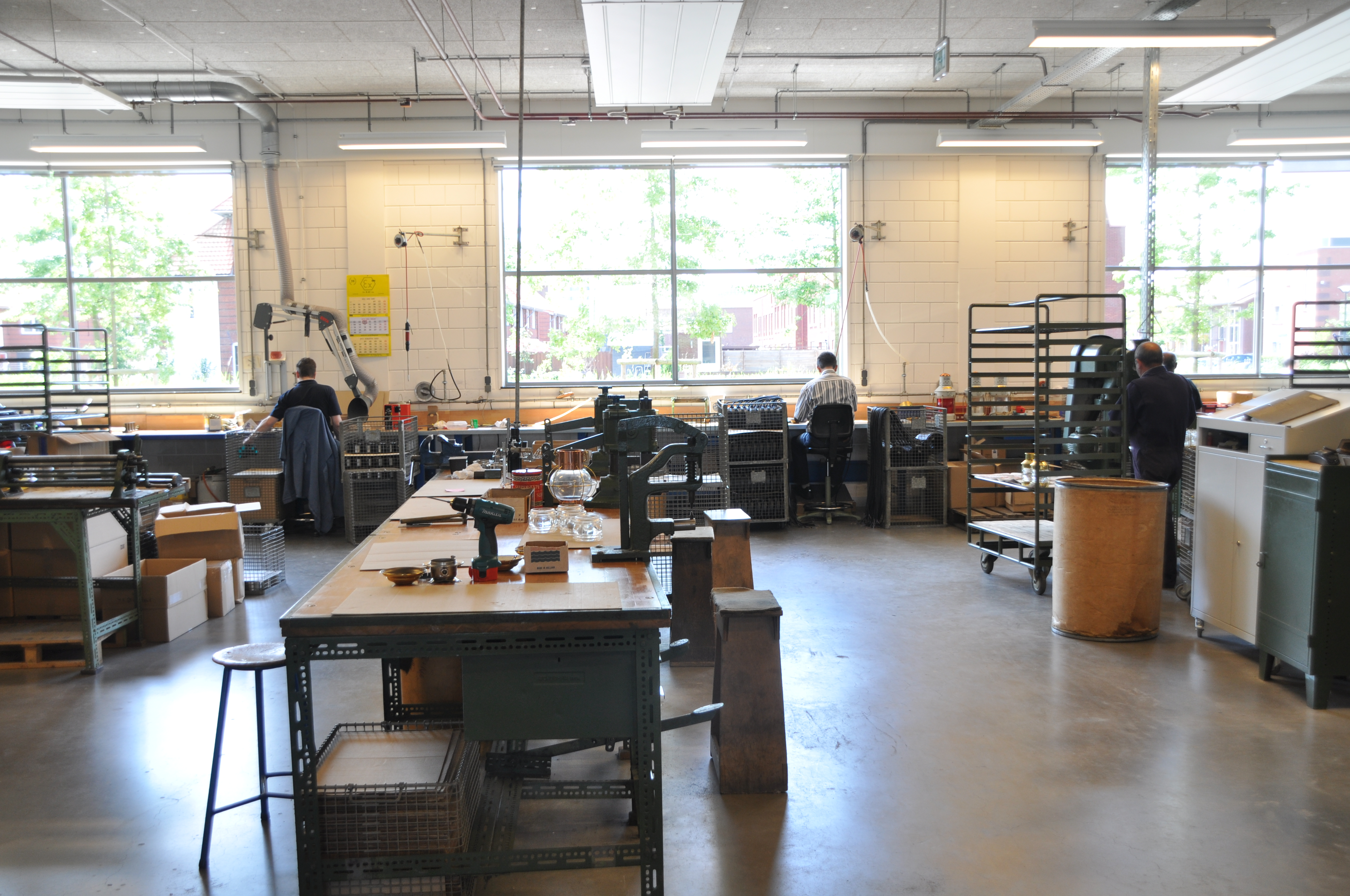 De werkplaats van DHR Den Haan Rotterdam (maar in Capelle)